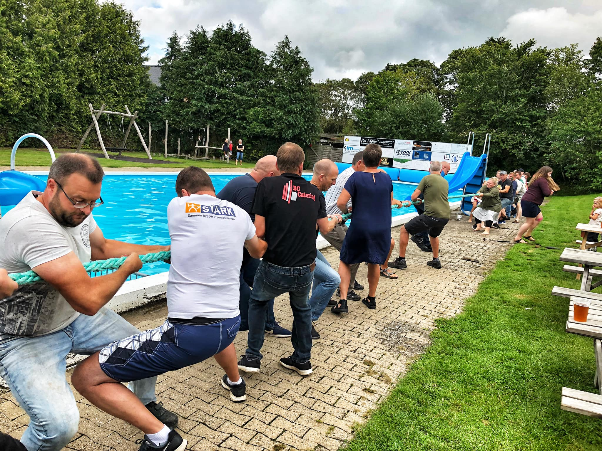 Den årlige tovtrækningskonkurrence mellem nord- og sydbyen i Voldby til årets badfest.